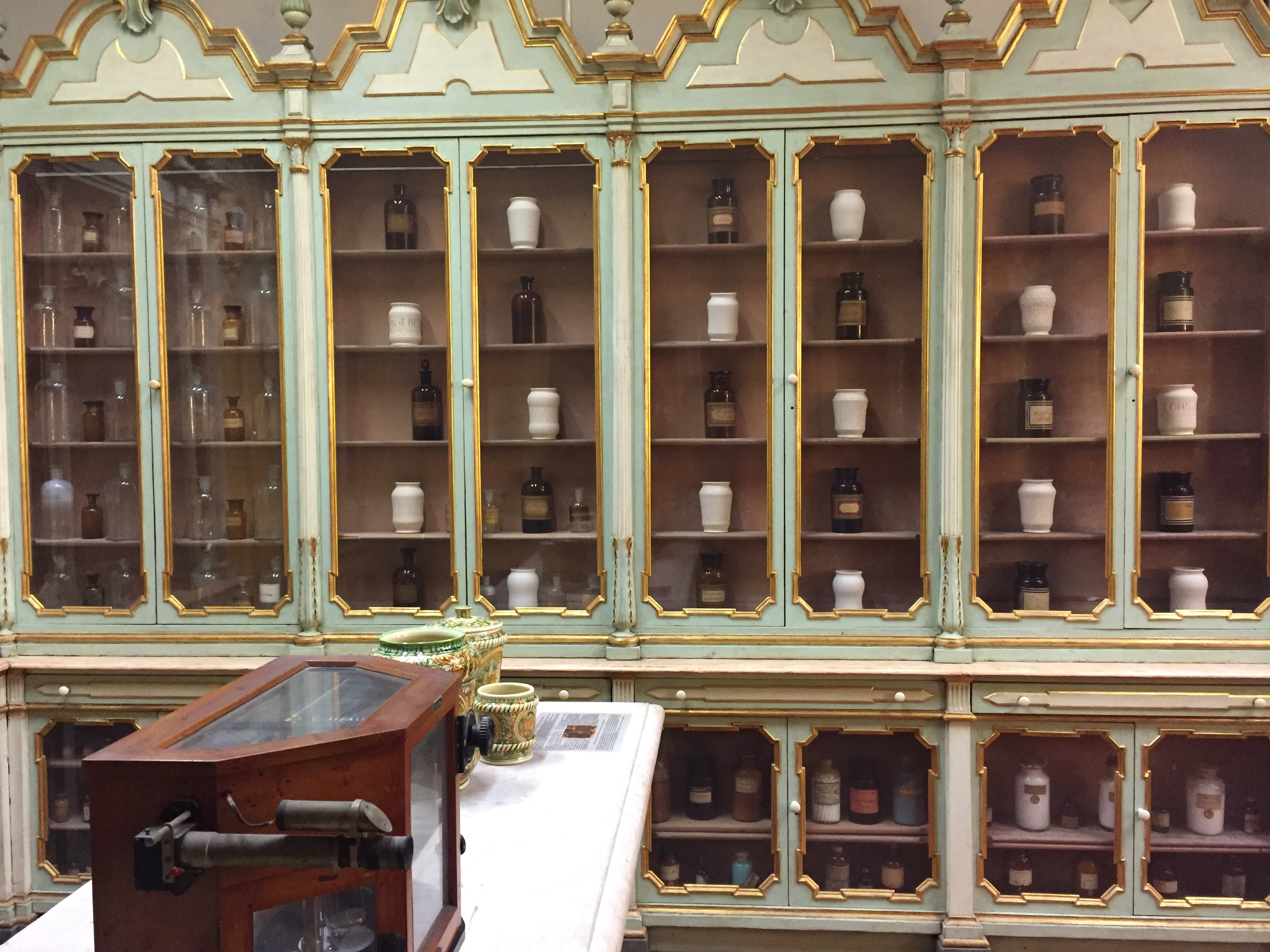 Arredi settecenteschi della farmacia Navarra, refettorio del convento della chiesa di Santa Maria delle Grazie, Dipartimento di Scienze della Vita e Biotecnologie, Università degli Studi di Ferrara